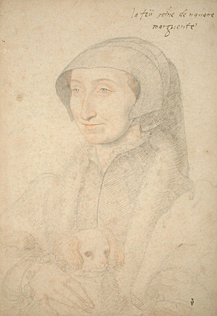 Marguerite d’Orléans puis d’Angoulême reine de Navarre duchesse d’Alençon et de Berry (1492-1549)